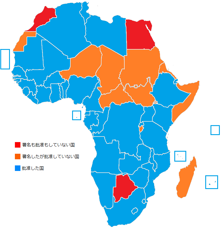 マプト議定書の署名、批准の状況（2019年）